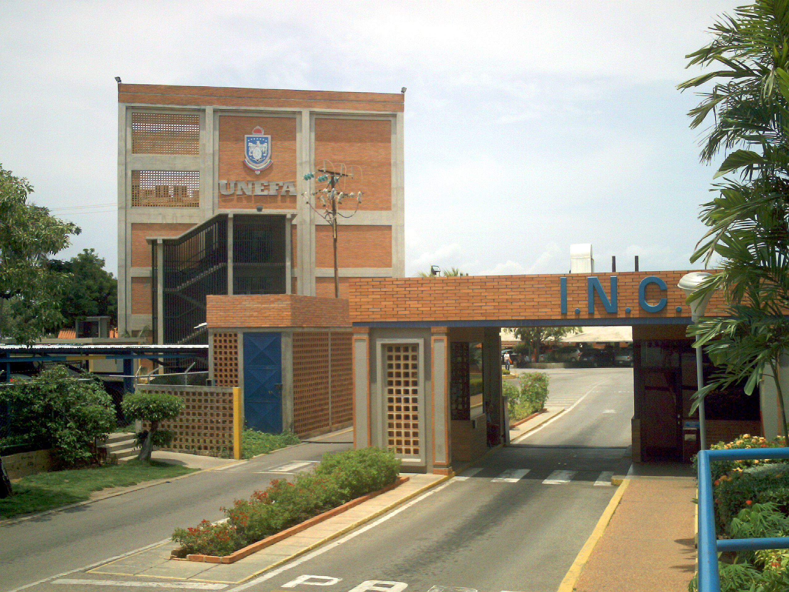 Universidad Nacional Experimental Politécnica de la Fuerza Armada Bolivariana. Núcleo Zulia, en la Av. El Milagro